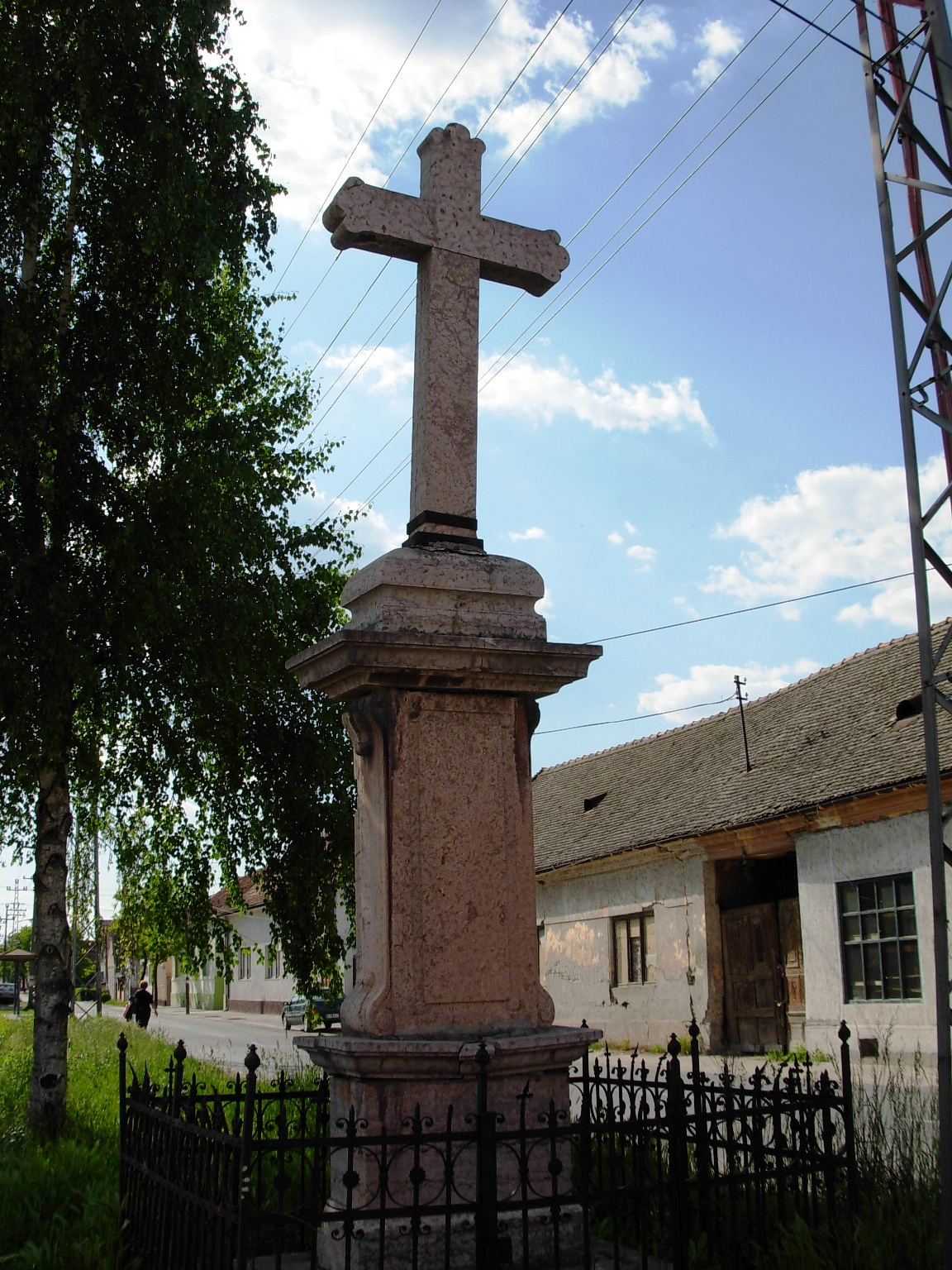 Zavetni krst u Futogu u neposrednoj blizini Crkve Svetog Kozme i Damjana. Podignut je 1803. godine, a visok je 6 metara.